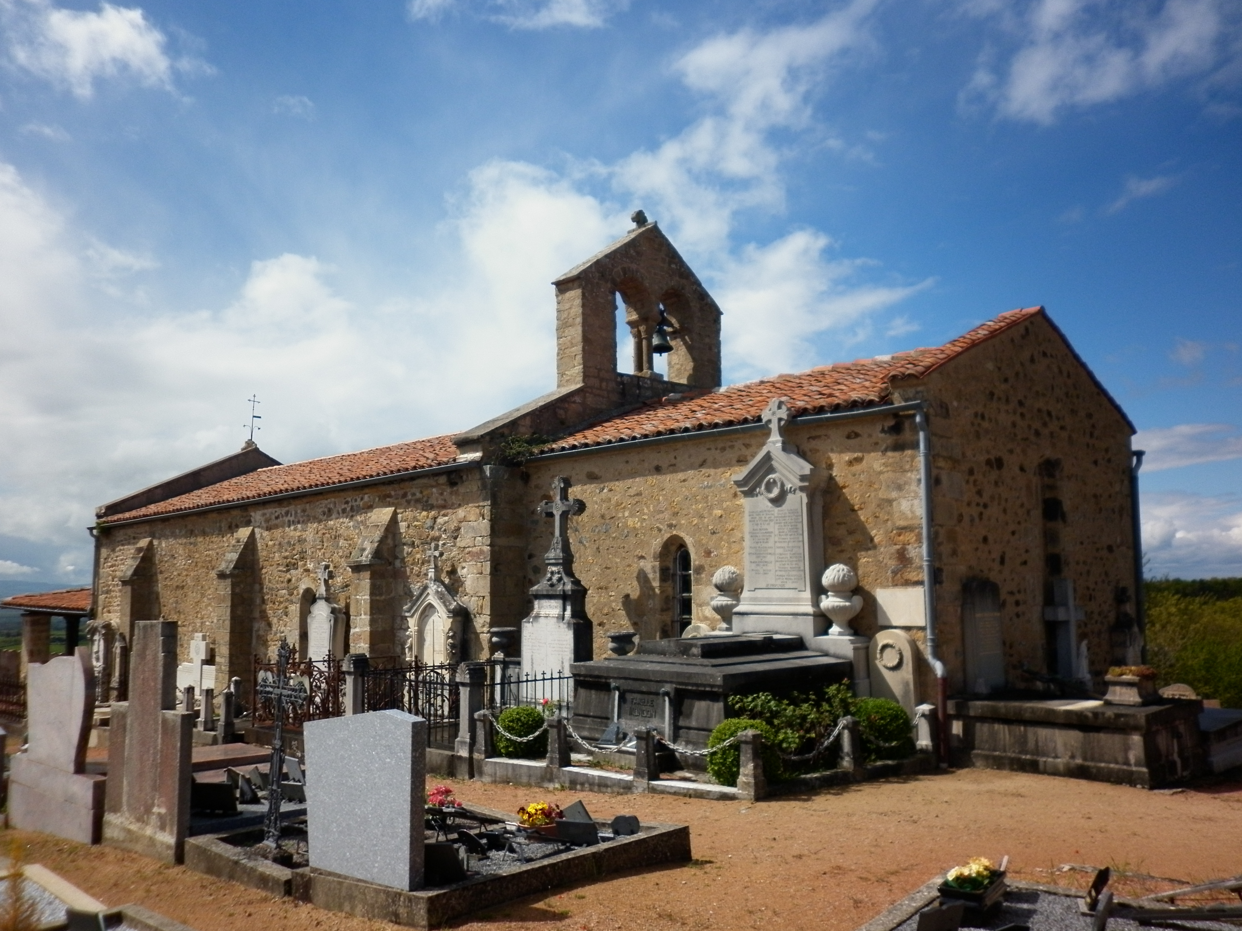 Chapelle Notre-Dame de Néronde